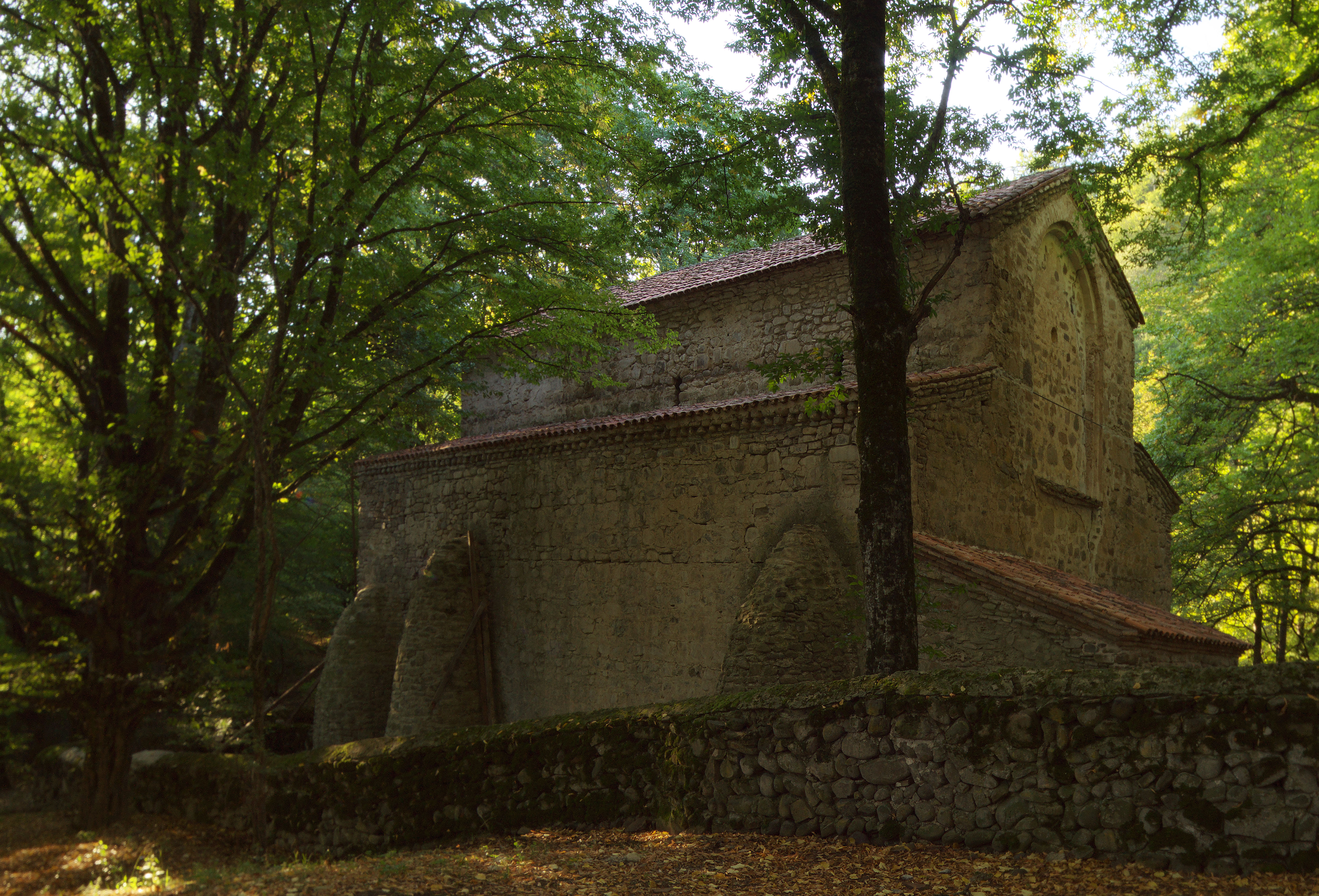 სოფელი აკურა, მამადავითის ტაძარი